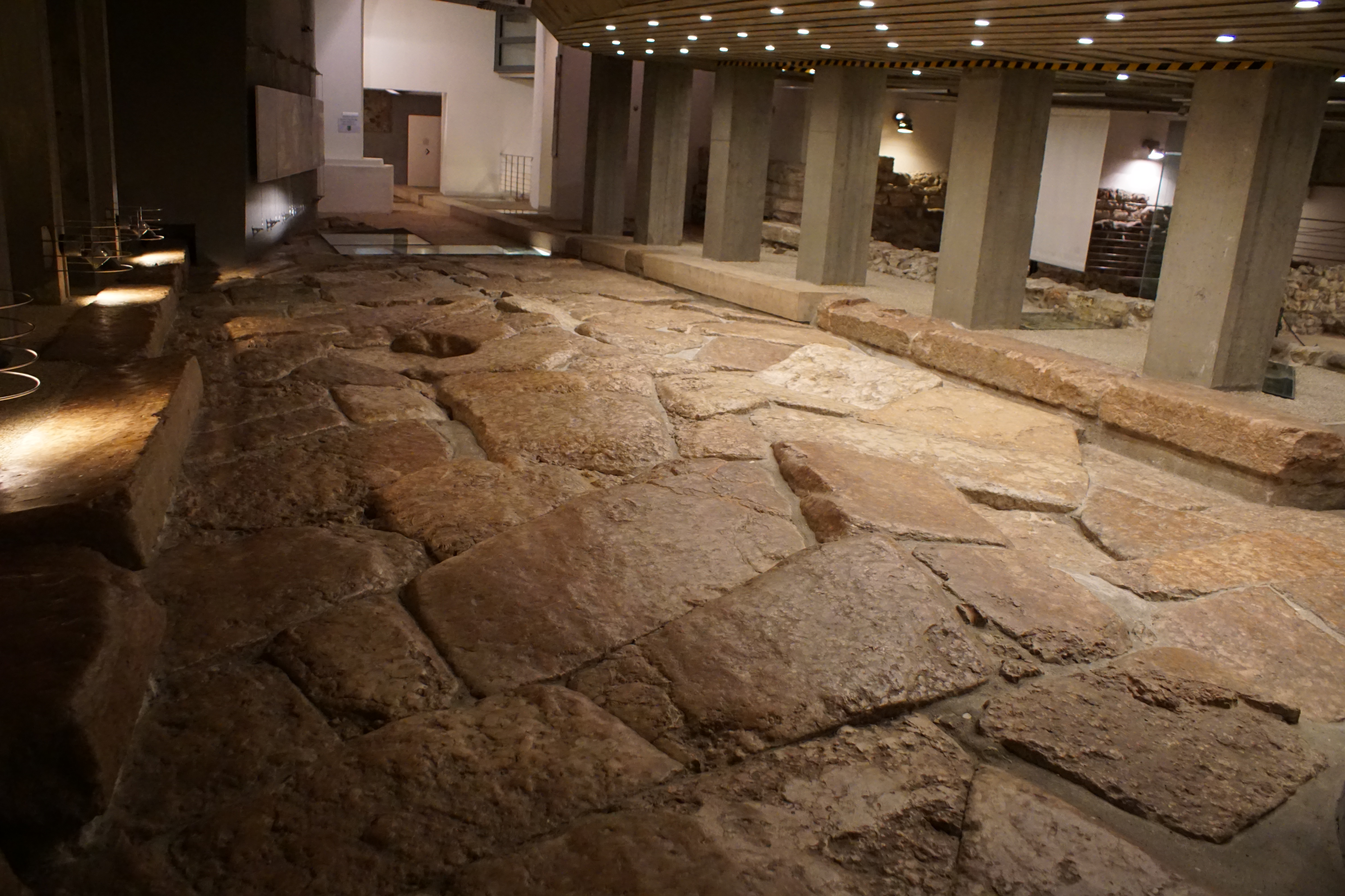 S.A.S.S. Spazio Archeologico Sotteraneo del Sas This is a photo of a monument which is part of cultural heritage of Italy.